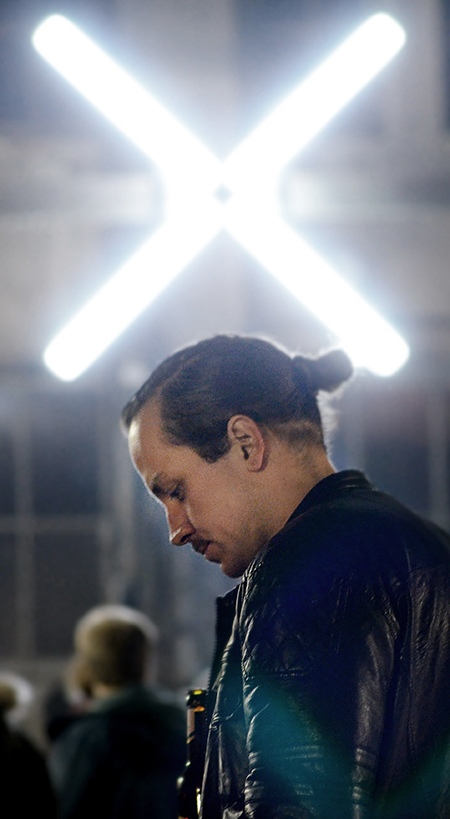 Sebastian Wanke; Aufnahme auf einer Ausstellung. Im Hintergrund zu sehen ist ein Teil der Arbeit "KOFEL ✕".